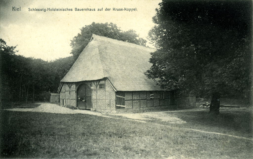 Bauernhaus auf der Krusenkoppel in Düsternbrook